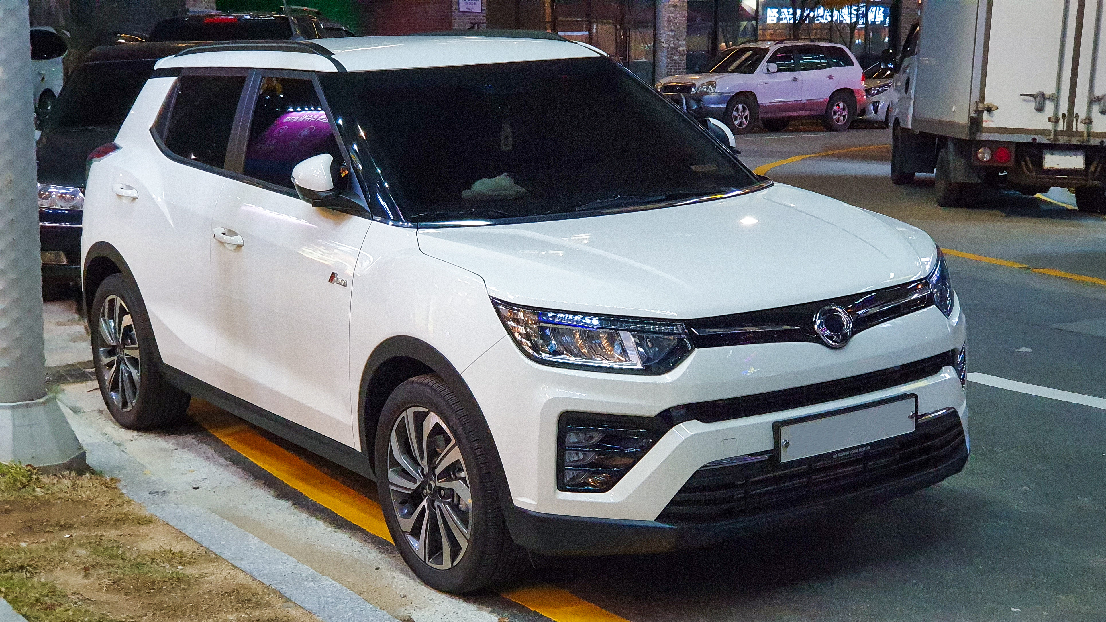 쌍용 티볼리 페이스리프트 (베리 뉴 티볼리/X150) 전면부